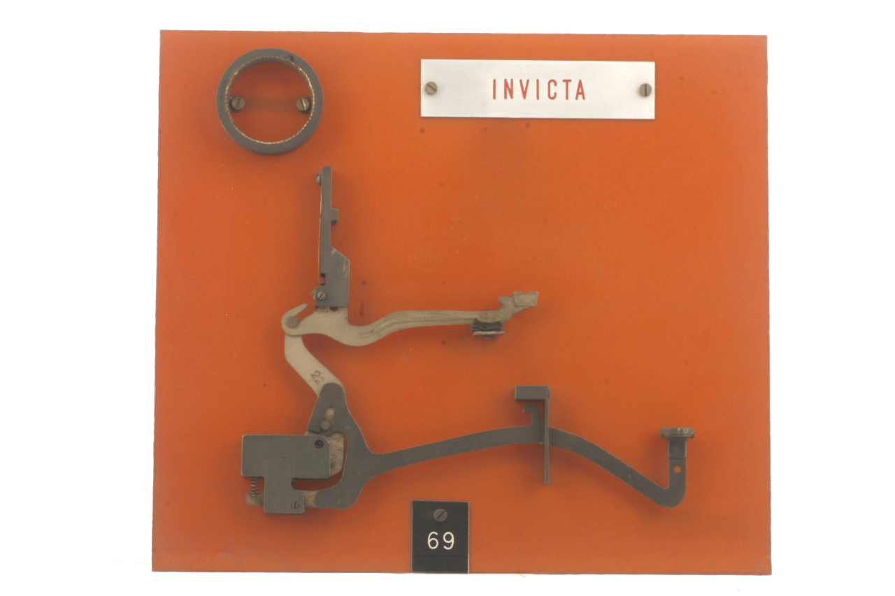 Cinematismo costituito da tre elementi principali in acciaio. La leva sagomata del tasto agisce, tramite una leva centrale che fa da tirante, sulla leva del martelletto portacaratteri (i caratteri riportati sono: "H" e "h"). Le articolazioni tra le tre leve sono cerniere a scorrimento. Il bottone del tasto è in celluloide trasparente su sfondo bianco riportante i caratteri "6" e "_". Il movimento di ritorno del tasto è guidato dalla molla a lamina che agisce direttamente sulla leva del martelletto portacaratteri ed è facilitato dalla molla a compressione agente sulla leva del tasto. Il cinematismo è fissato ad un pannello in bachelite. Funzione Stampa del carattere tipografico da parte di una macchina per scrivere. Notizie storico-critiche La collezione consiste in 241 cinematismi di macchine per scrivere, fissati su un supporto in bachelite e originariamente sistemati in 11 pannelli di 199 x 104 cm con intelaiatura in alluminio. I pannelli erano identificati con una lettera da A ad L, con K finale. I cinematismi, a loro volta, sono numerati con un cartellino da 1 (pannello A) a 230 (pannello K), per riprendere da 1 a 9 (pannello K, con cartellino differente). Nel 2008, per esigenze conservative, i pannelli sono stati smantellati e i singoli cinematismi sono stati ricollocati in appositi contenitori La collezione è stata raccolta in un trentennio circa da Matteo Calizzano, progettista di macchine per scrivere, che ha lavorato presso la Antares e la Olivetti. La collezione è stata donata dalla figlia, Ada Calizzano, nel 1987.